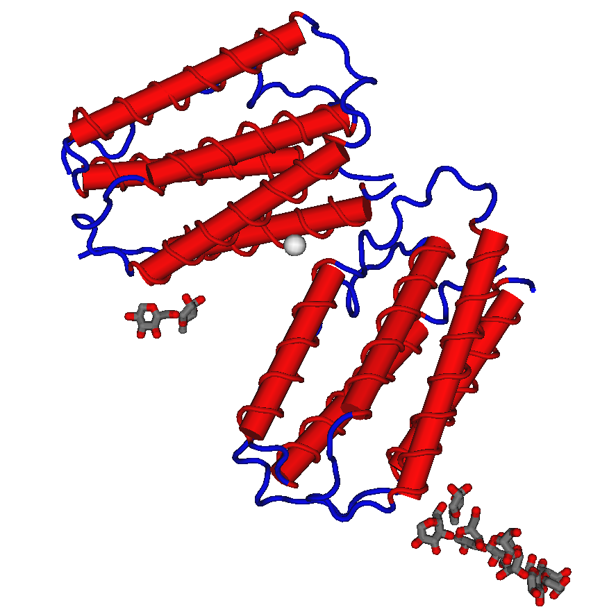 1AU1_Human_Interferon-Beta